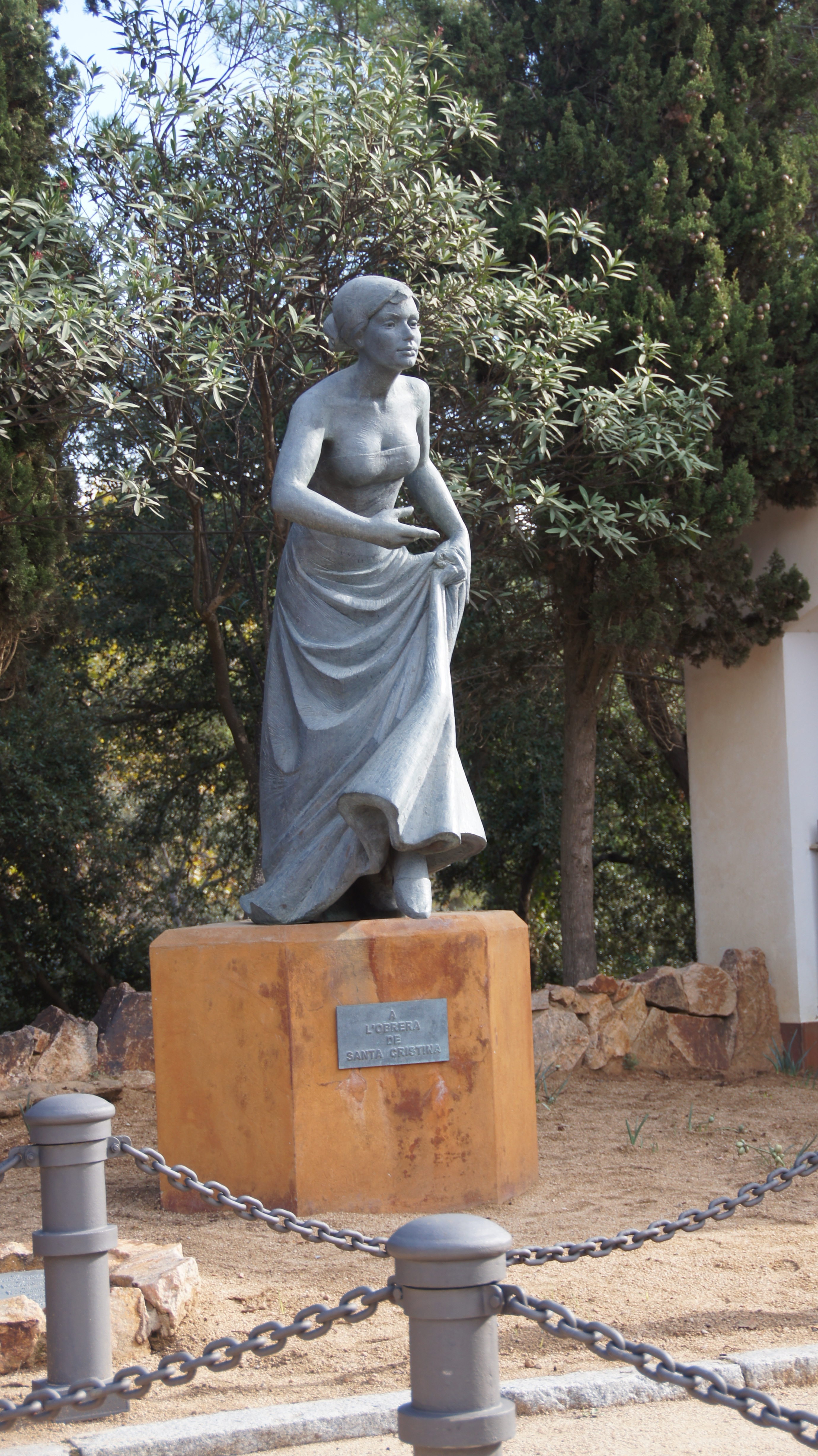 Lloret, Ermita de Santa Cristina, Denkmal L'Obrera de Santa Cristina